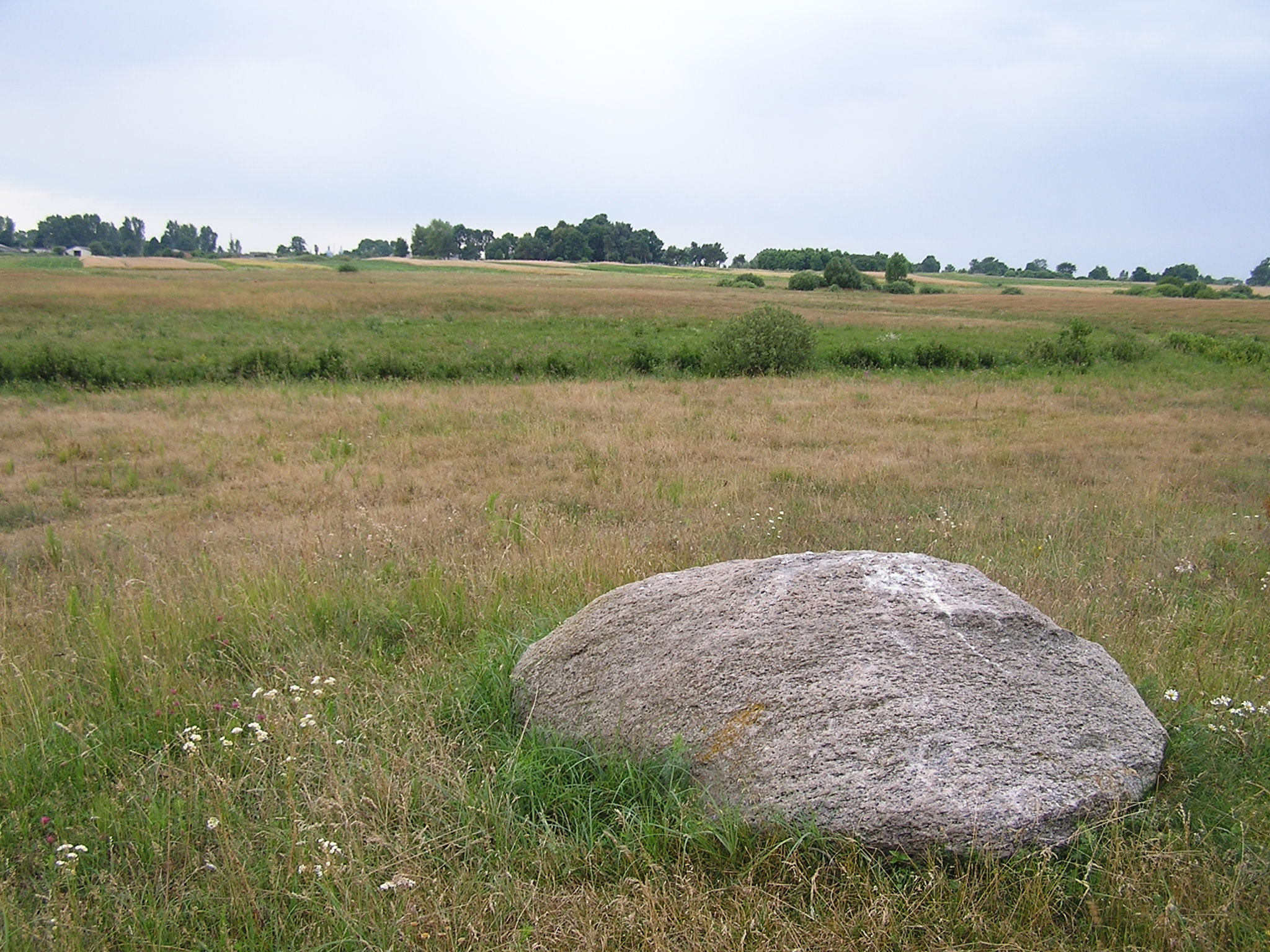 Великий камінь, залишений льодовиком